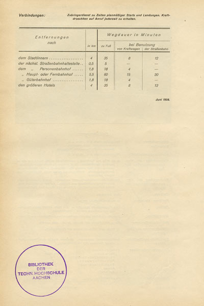 Hier sieht man die Entfernungen.